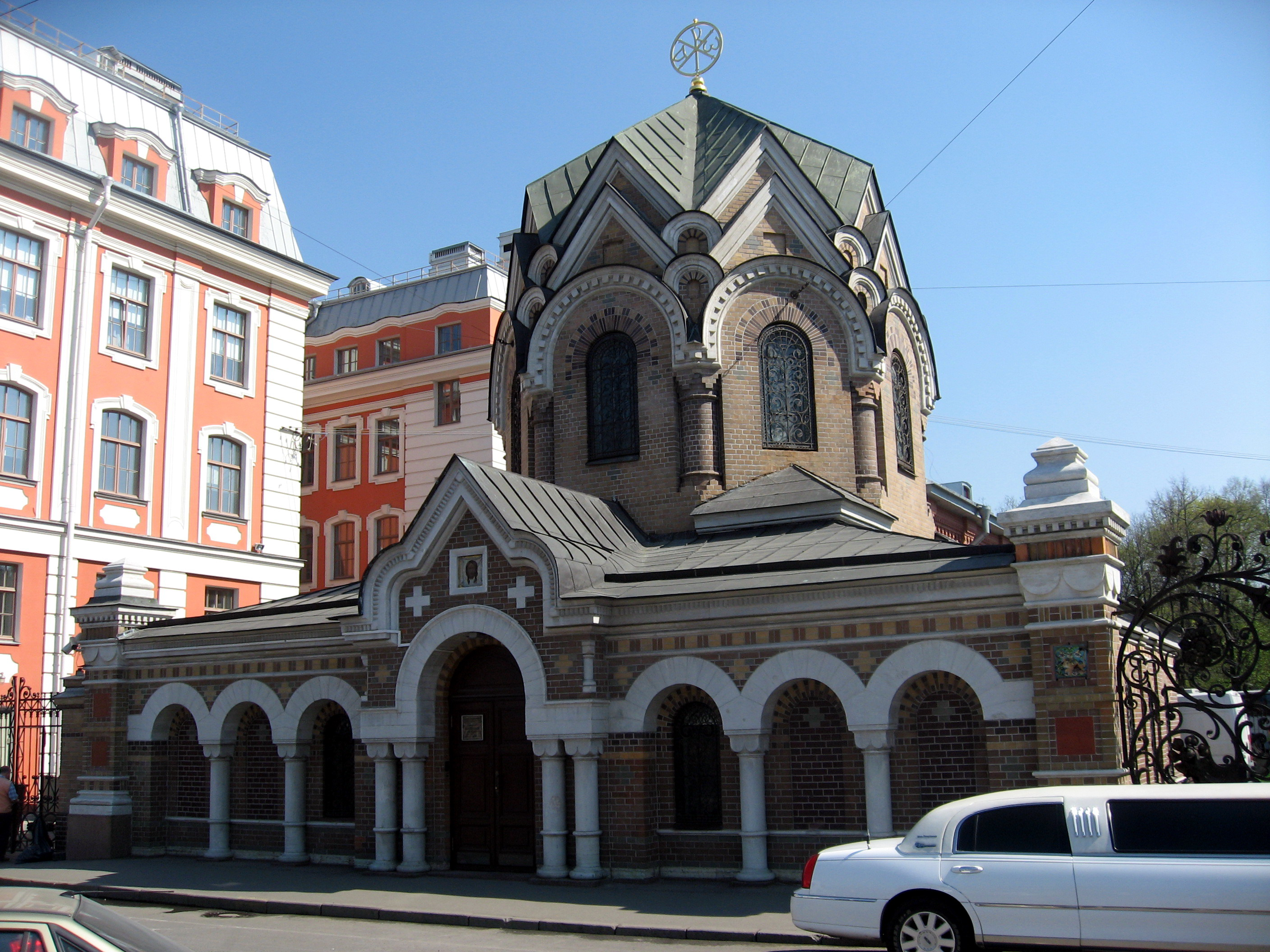 Sankt-Petěrburg (Petrohrad)